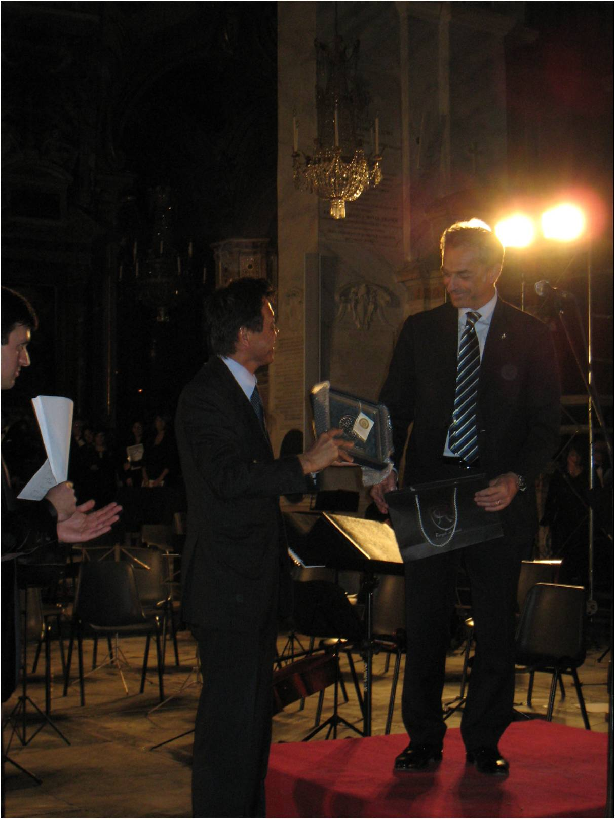 Nazario Pagano, President of the Abruzzo Regional Council, presented the shield to Yasuhiro Andō, Ambassador to Italy, in L'Aquila Comune, L'Aquila Province, Abruzzo Region on April 6, 2011. (c.f. "東日本大震災をめぐるイタリア、アルバニア、マルタ、サンマリノでの日本支援エピソード集", ambasciata del giappone, Ambasciata del Giappone in Italia.)